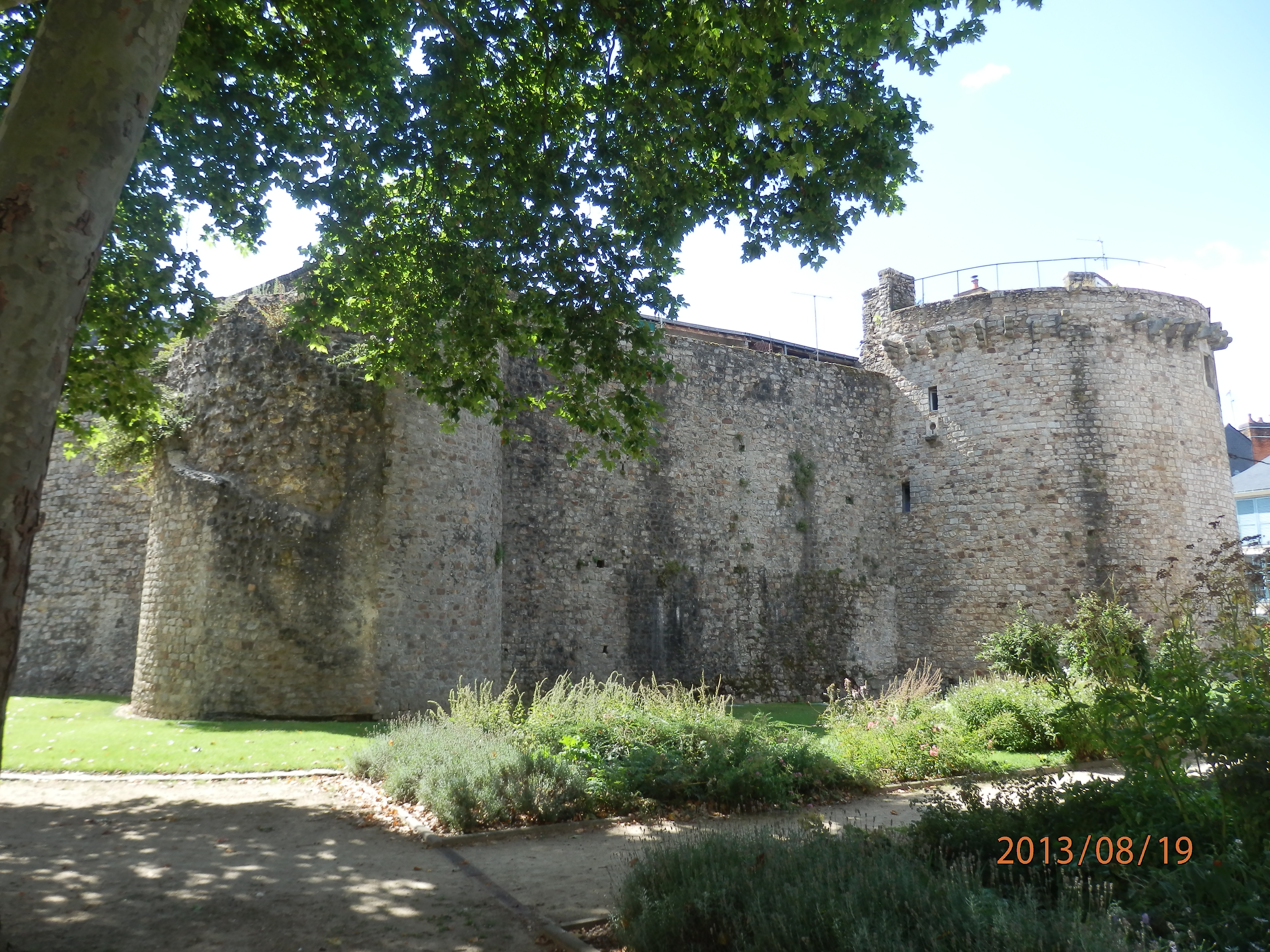 Ancien donjon du Mans, qui verrouillait l'accès nord de la ville.